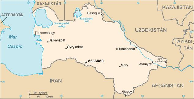 Mapo de Turkmenio.